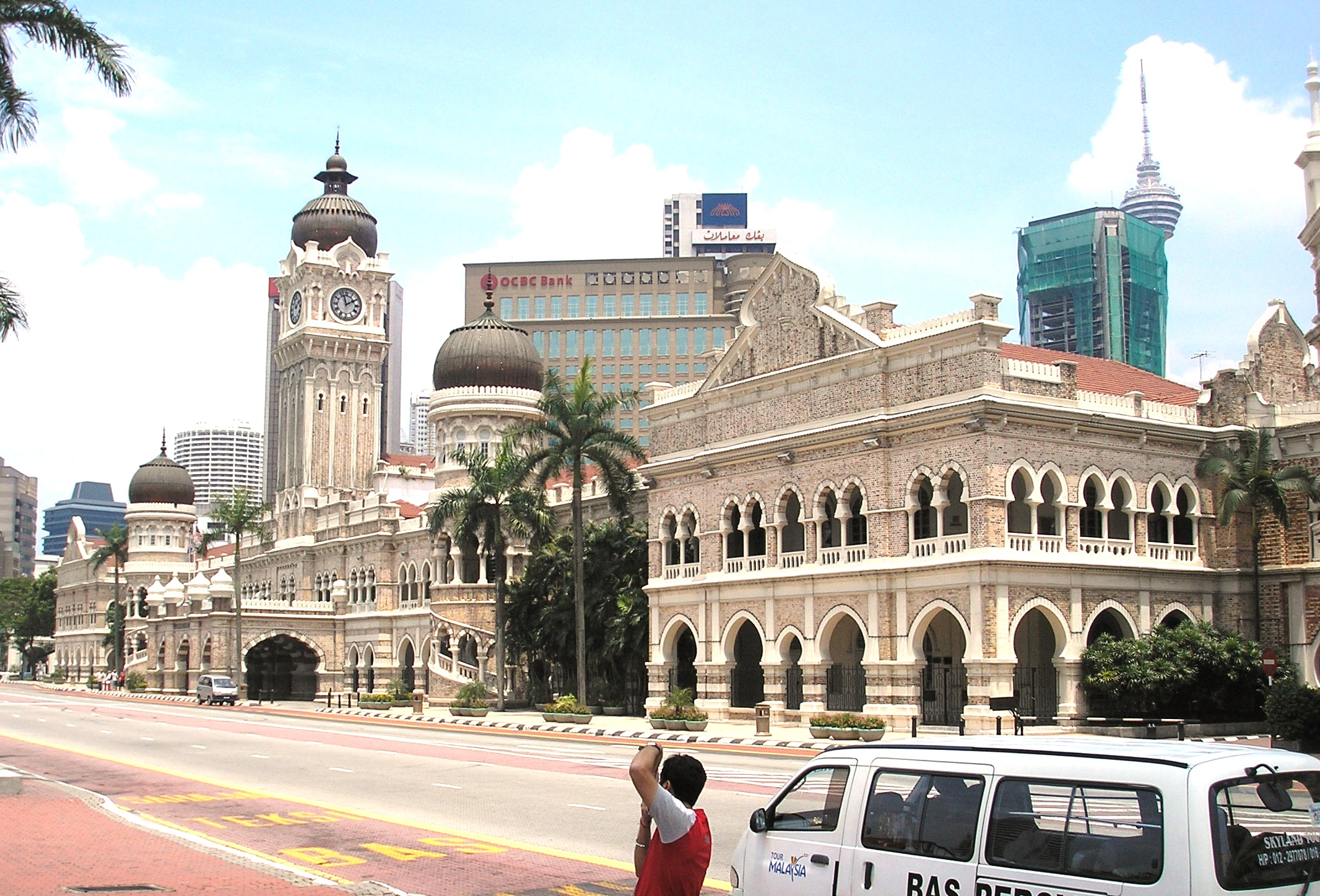 The Sultan Abdul Samad Building, Merdeka Square, Kuala Lumpur, Malaysia.